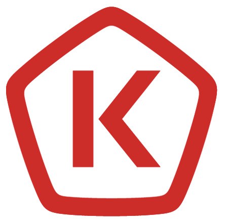 Российский Знак качества